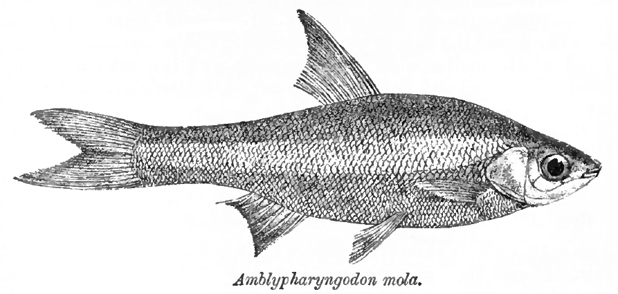 Amblypharyngodon mola (Hamilton, 1822)